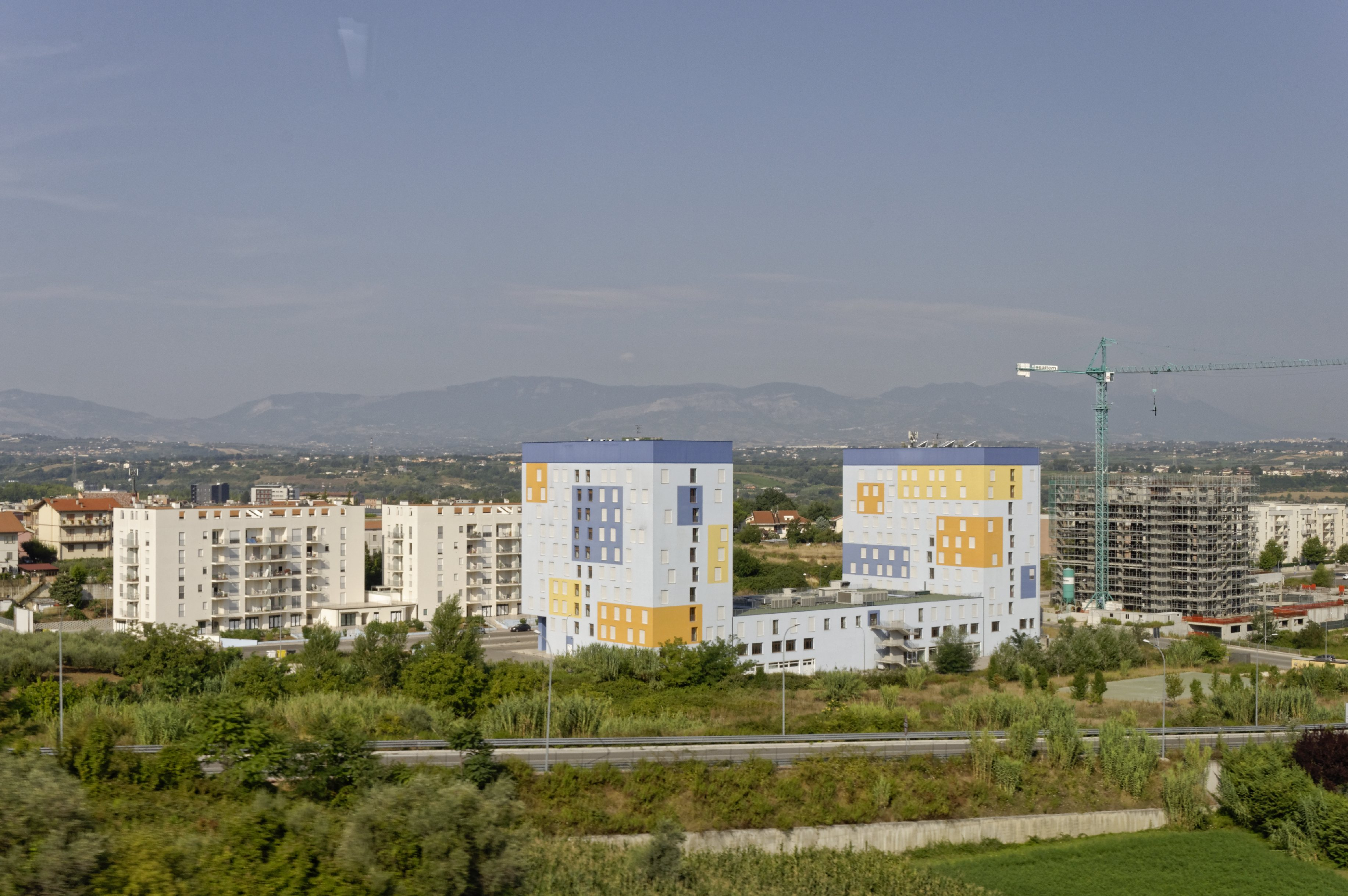 Chieti 2015